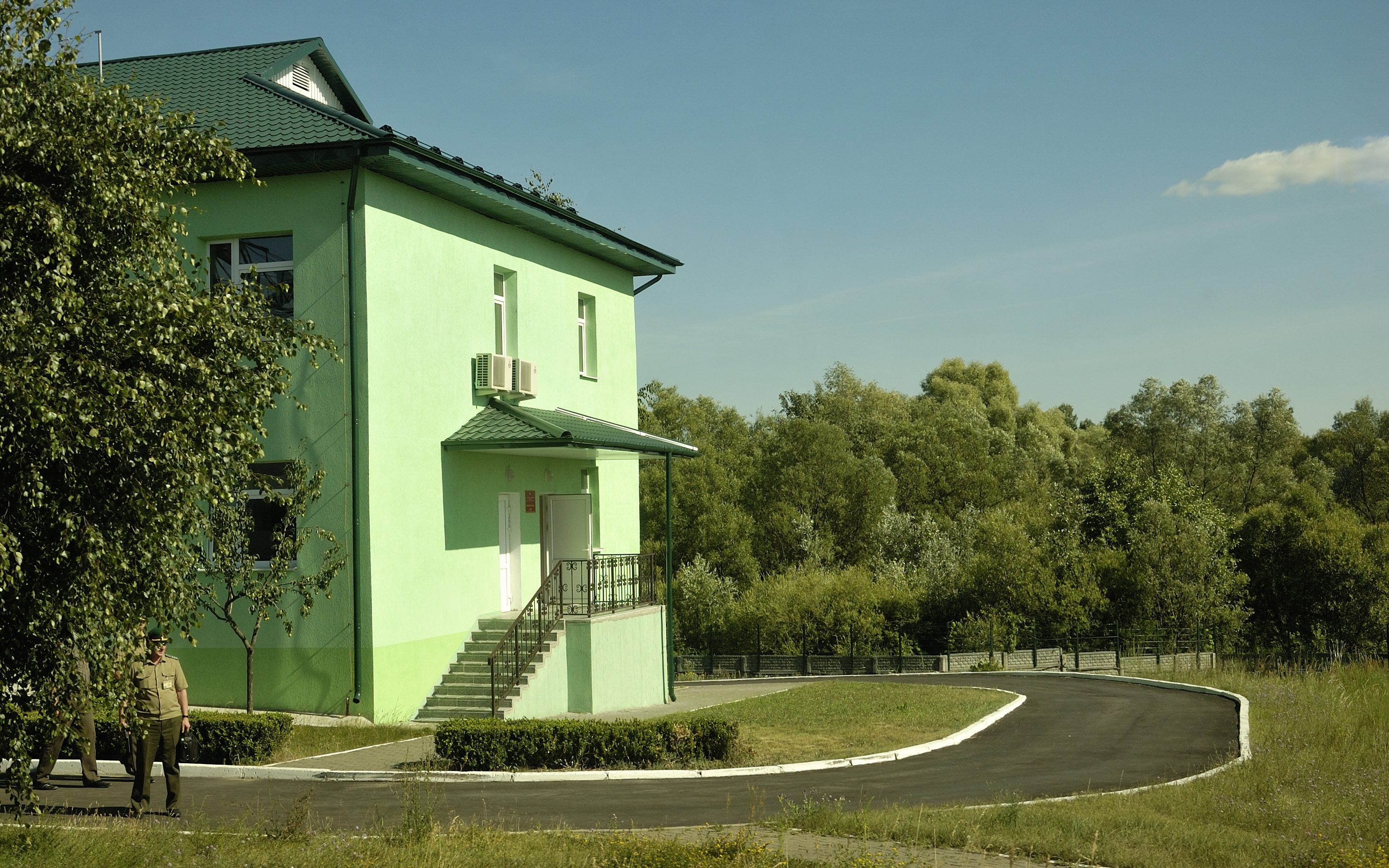 Отделение паспортного контроля "Буг" имени Кублашвили